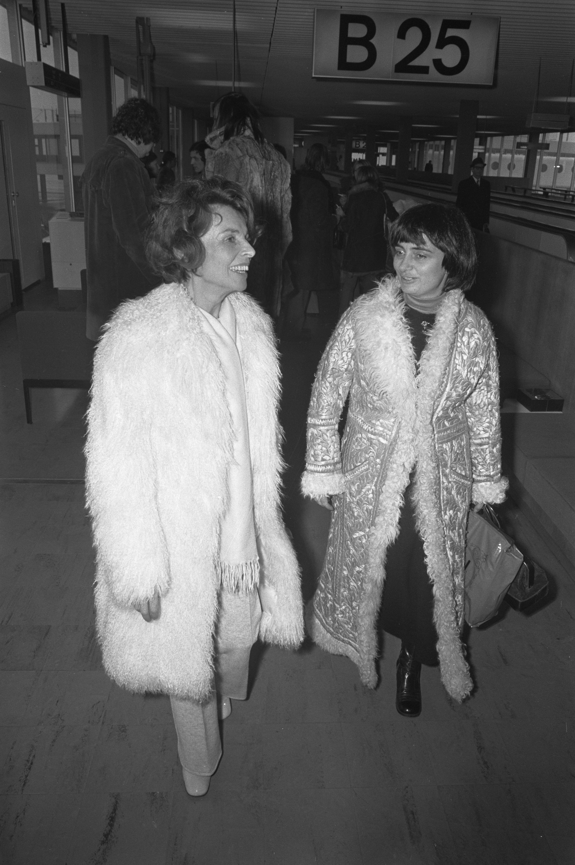 Collectie / Archief : Fotocollectie Anefo Reportage / Serie : [ onbekend ] Beschrijving : Franse actrices voor Cinemanifestatie op Schiphol Mag Bodard (filmproducente) en Agnes Varda (rechts) filmregisseuse Datum : 2 februari 1972 Locatie : Noord-Holland, Schiphol Trefwoorden : acteurs, vliegvelden Persoonsnaam : Bodard, Mag, Varda, Agnes Fotograaf : Evers, Joost / Anefo Auteursrechthebbende : Nationaal Archief Materiaalsoort : Negatief (zwart/wit) Nummer archiefinventaris : bekijk toegang 2.24.01.05 Bestanddeelnummer : 925-3551